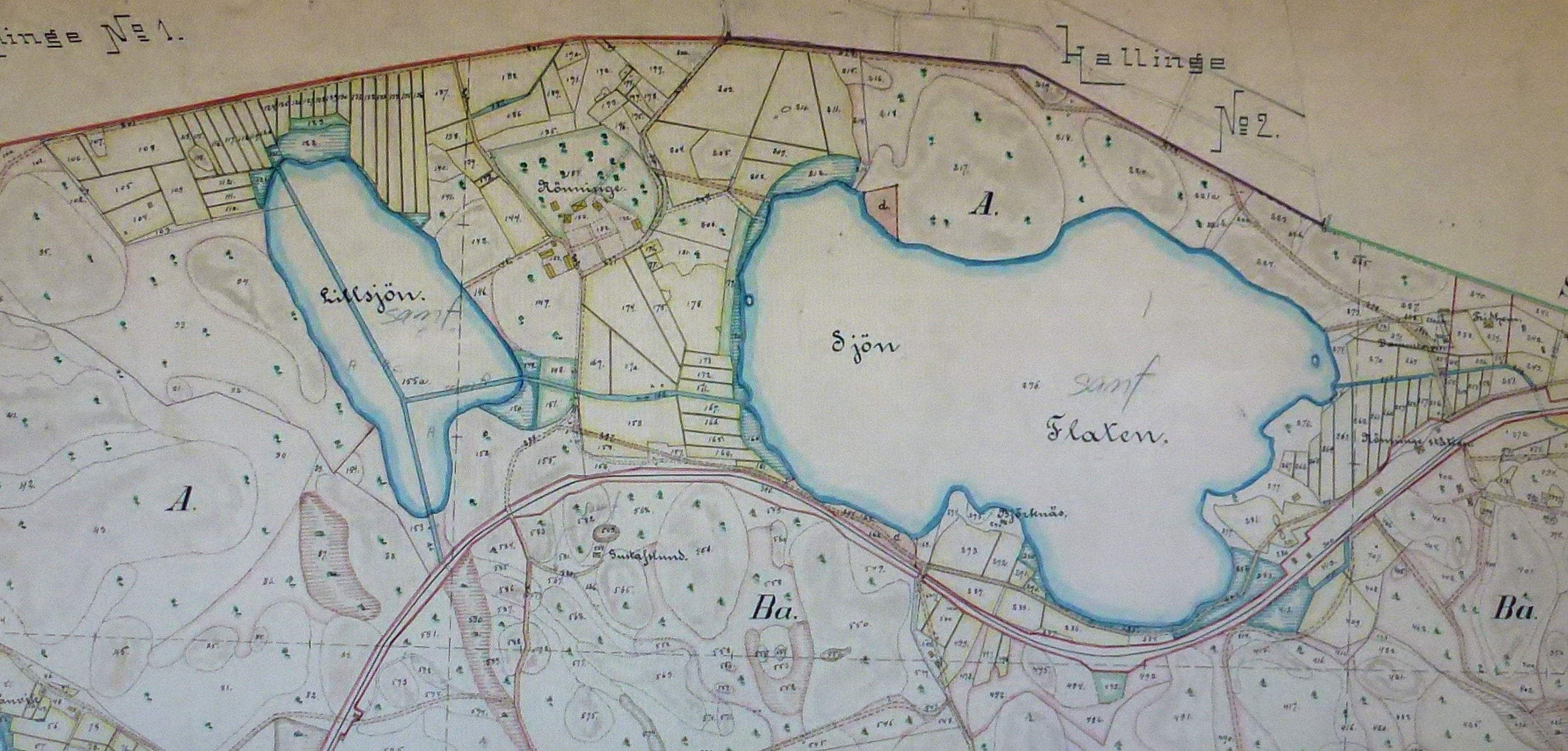 Rönninge gård laga skifte 1897